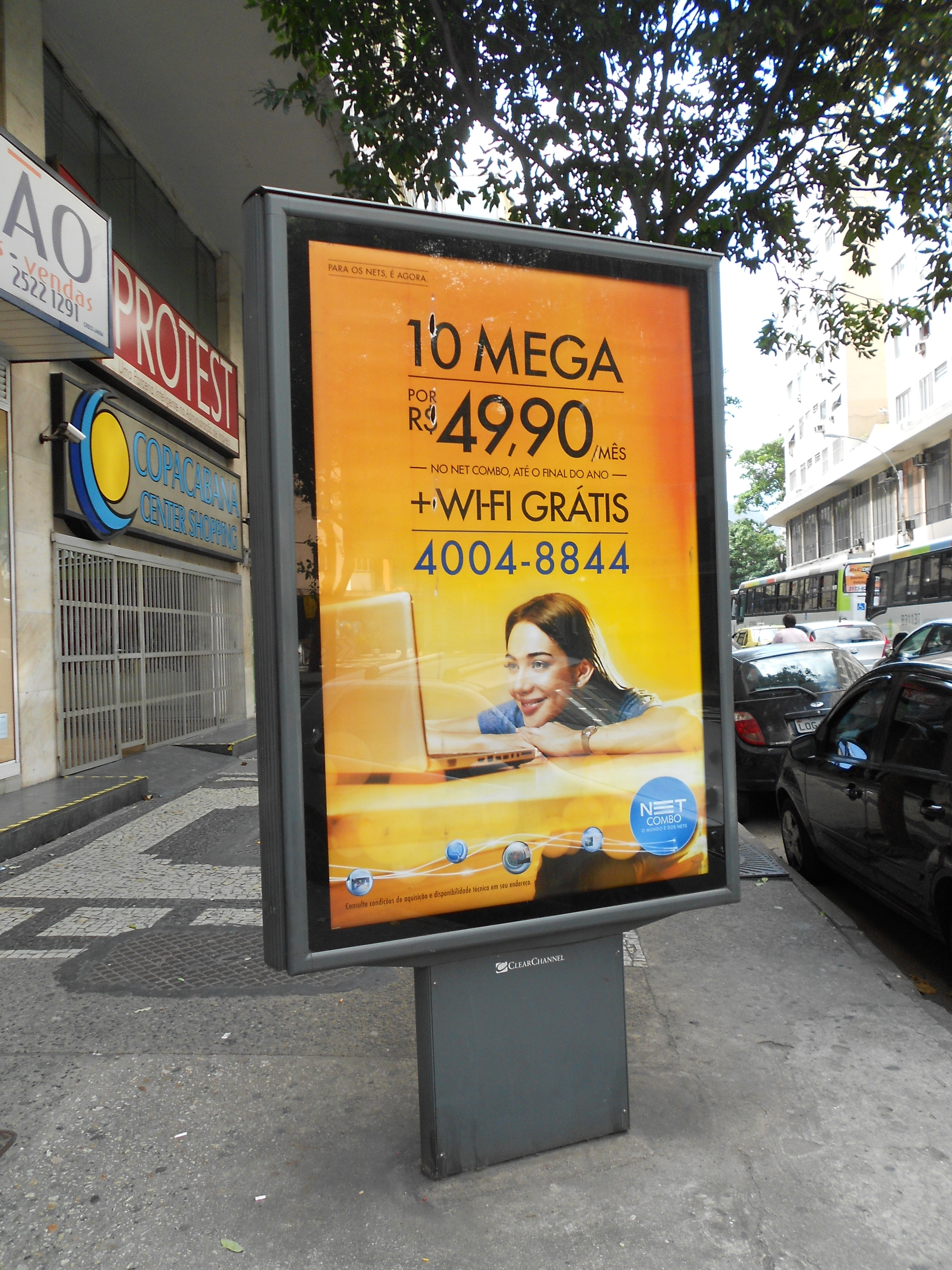 Anúncio na Avenida Nossa Senhora de Copacabana, bairro de mesmo nome, Rio de Janeiro, Brasil.